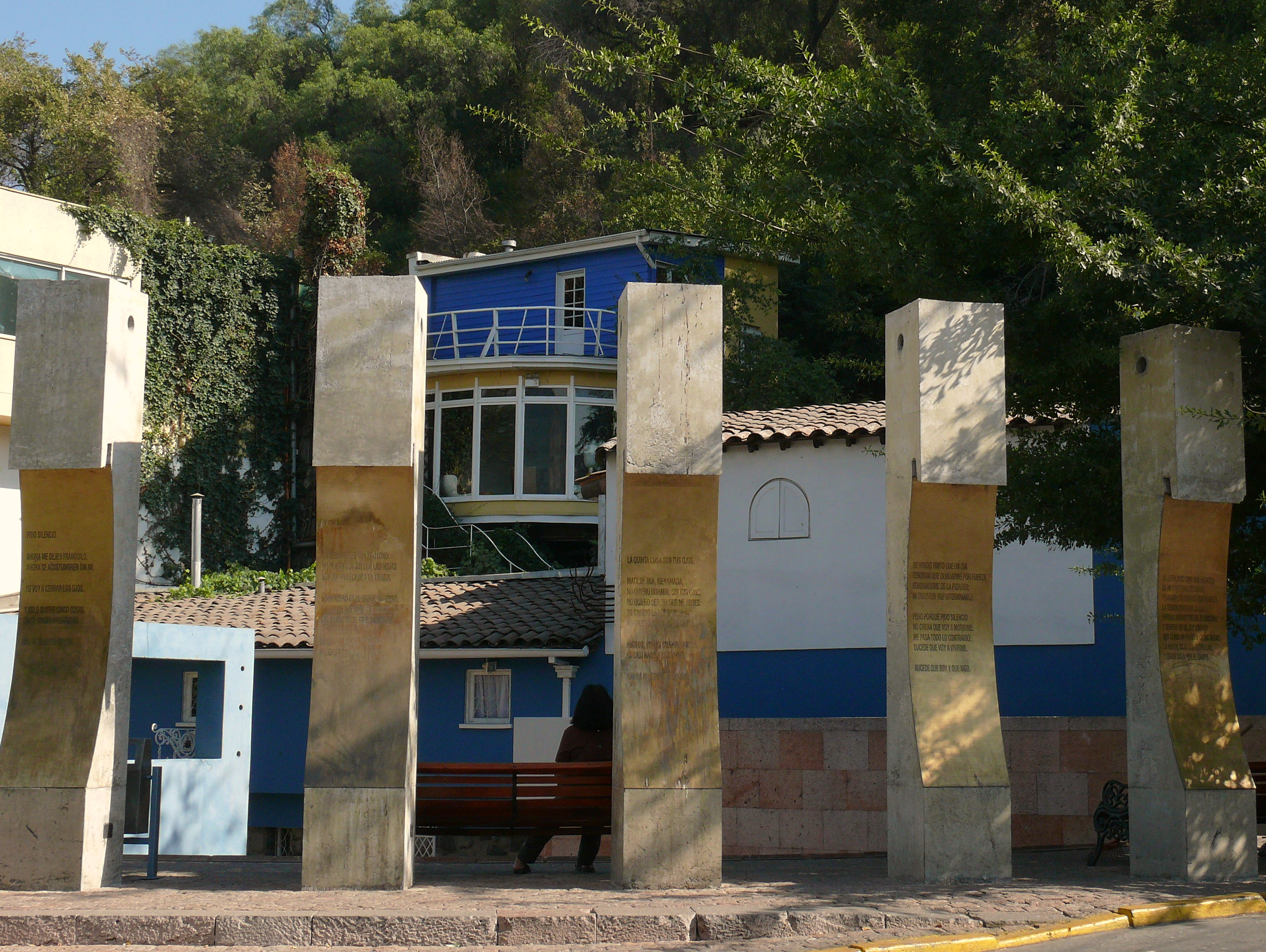 Vista de la casa de Pablo Neruda "La Chascona" This is a photo of a national monument in Chile: 874